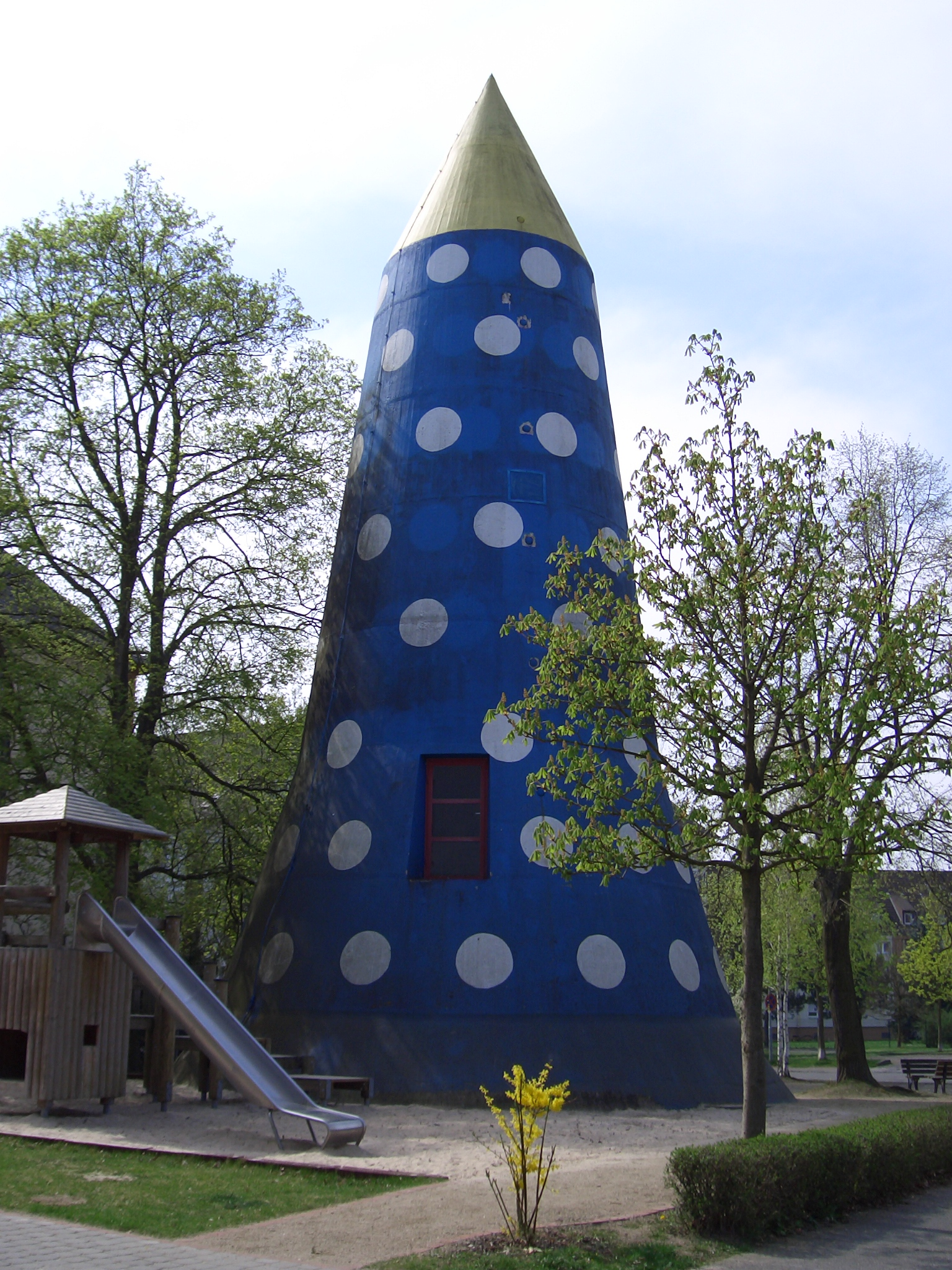 Bunker der Bauart "Winkel". Standort ist das Gelände der ehem. Artillerie-Kaserne in Gießen (Grünberger Str.)